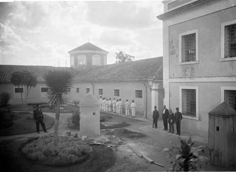 Presídio Tiradentes antes da demolição, localizado na Avenida Tiradentes no bairro do Bom Retiro, São Paulo (SP), Brasil.